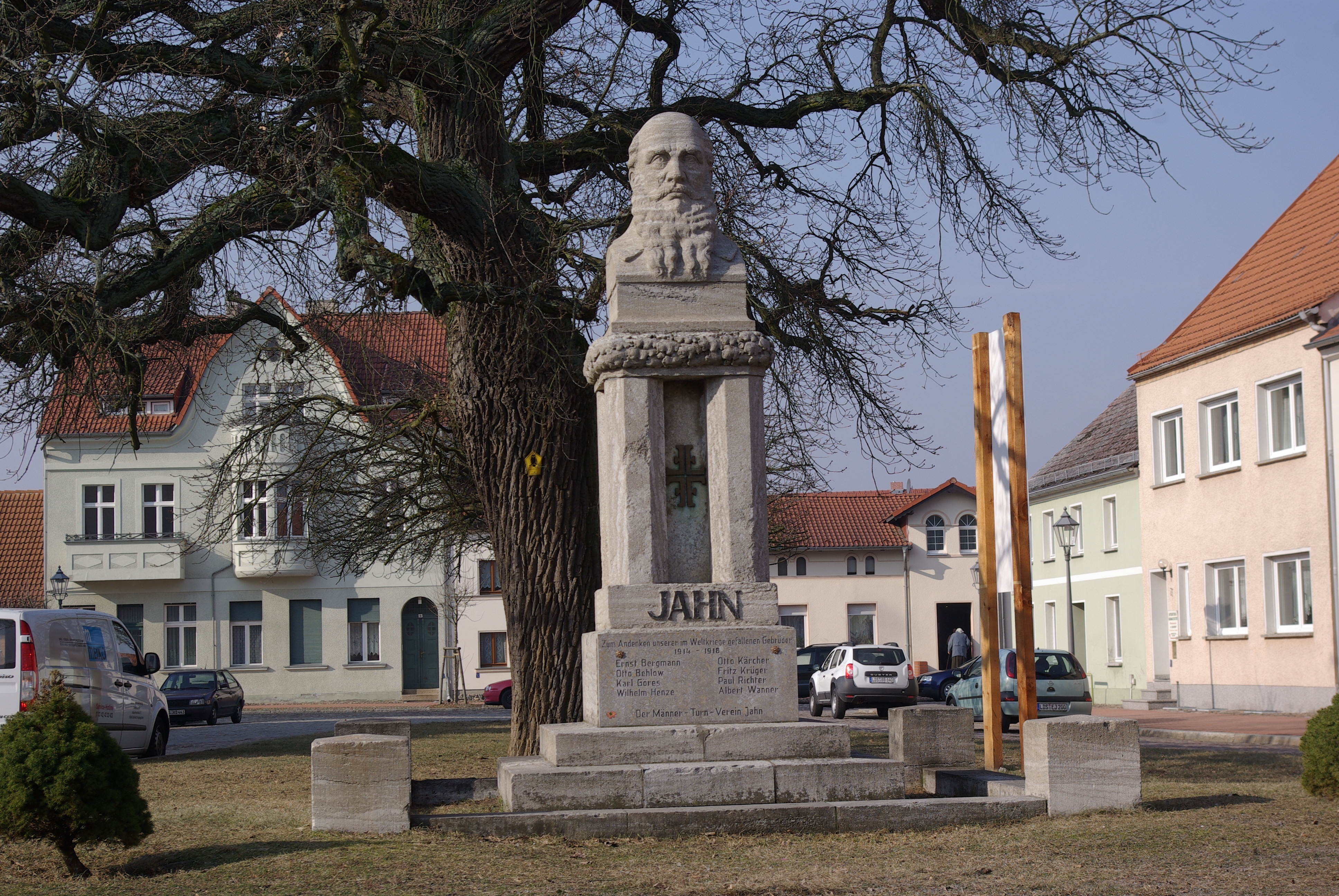 Mittenwalde in Brandenburg. Das Jahndenkmal für Friedrich Ludwig Jahn, auch bekannt als Turnvater Jahn, steht am Salzmarkt.